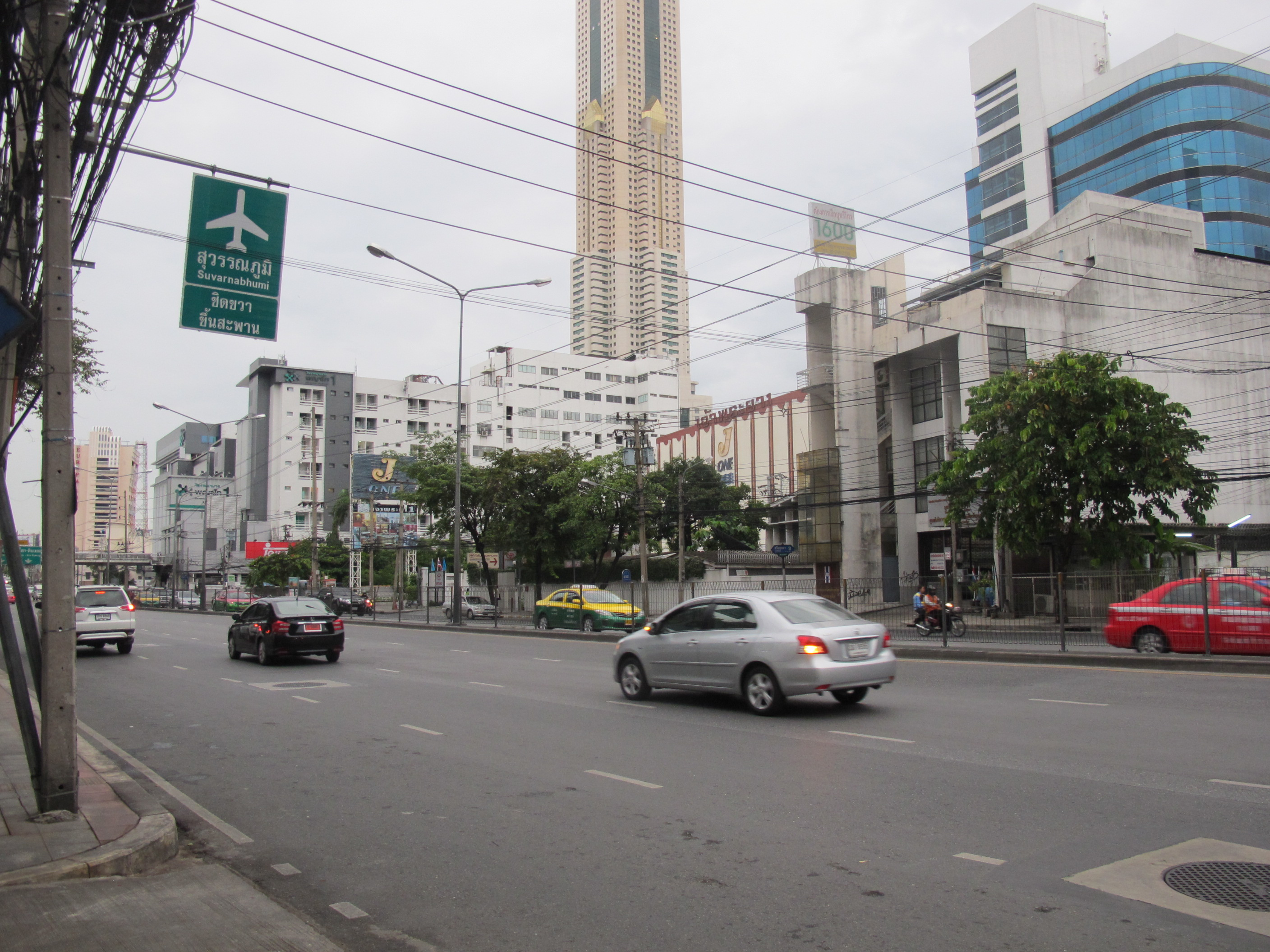 泰国曼谷街景